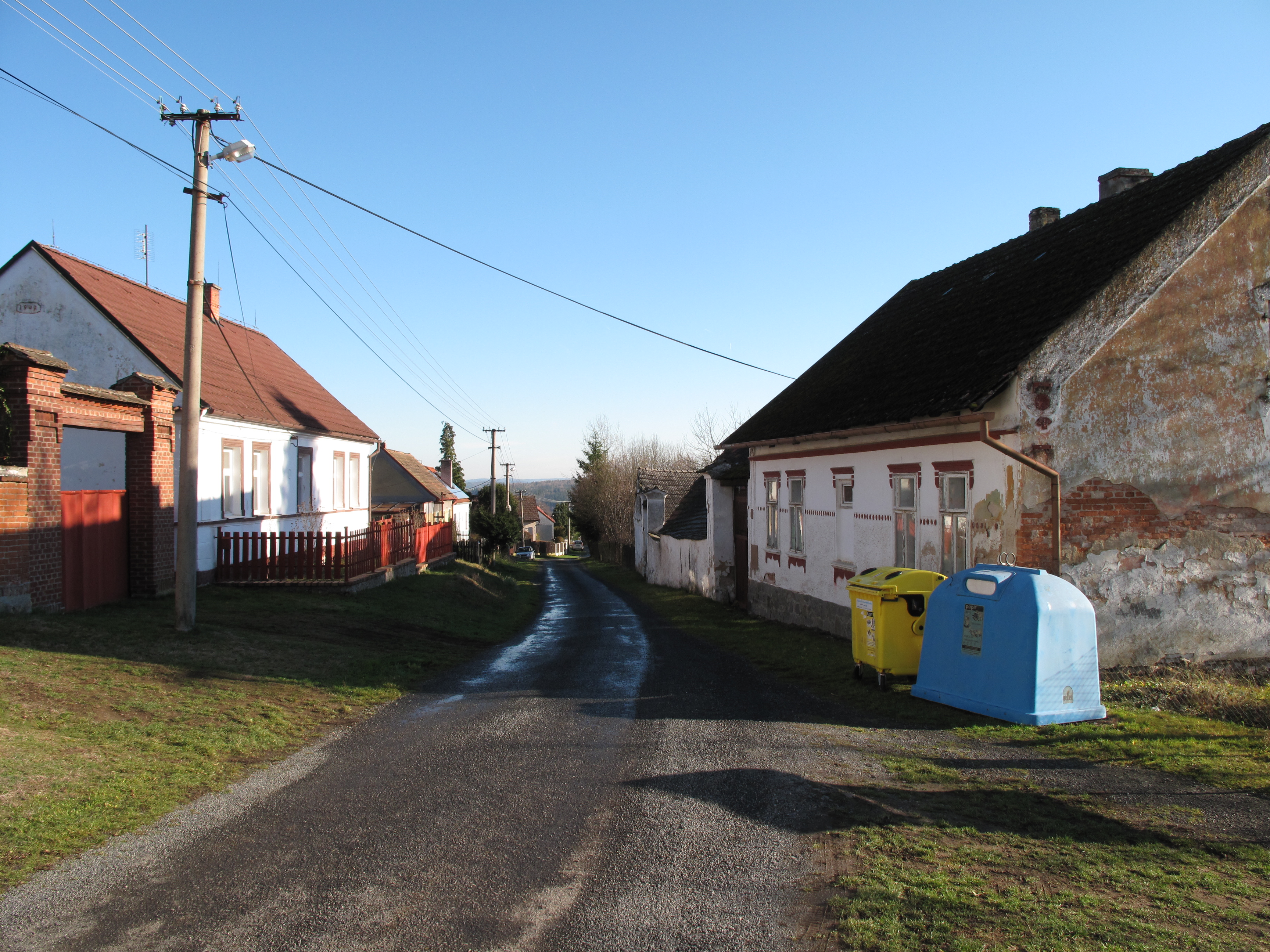 Domy ve Lhotě. Okres Plzeň-jih, Česká republika.